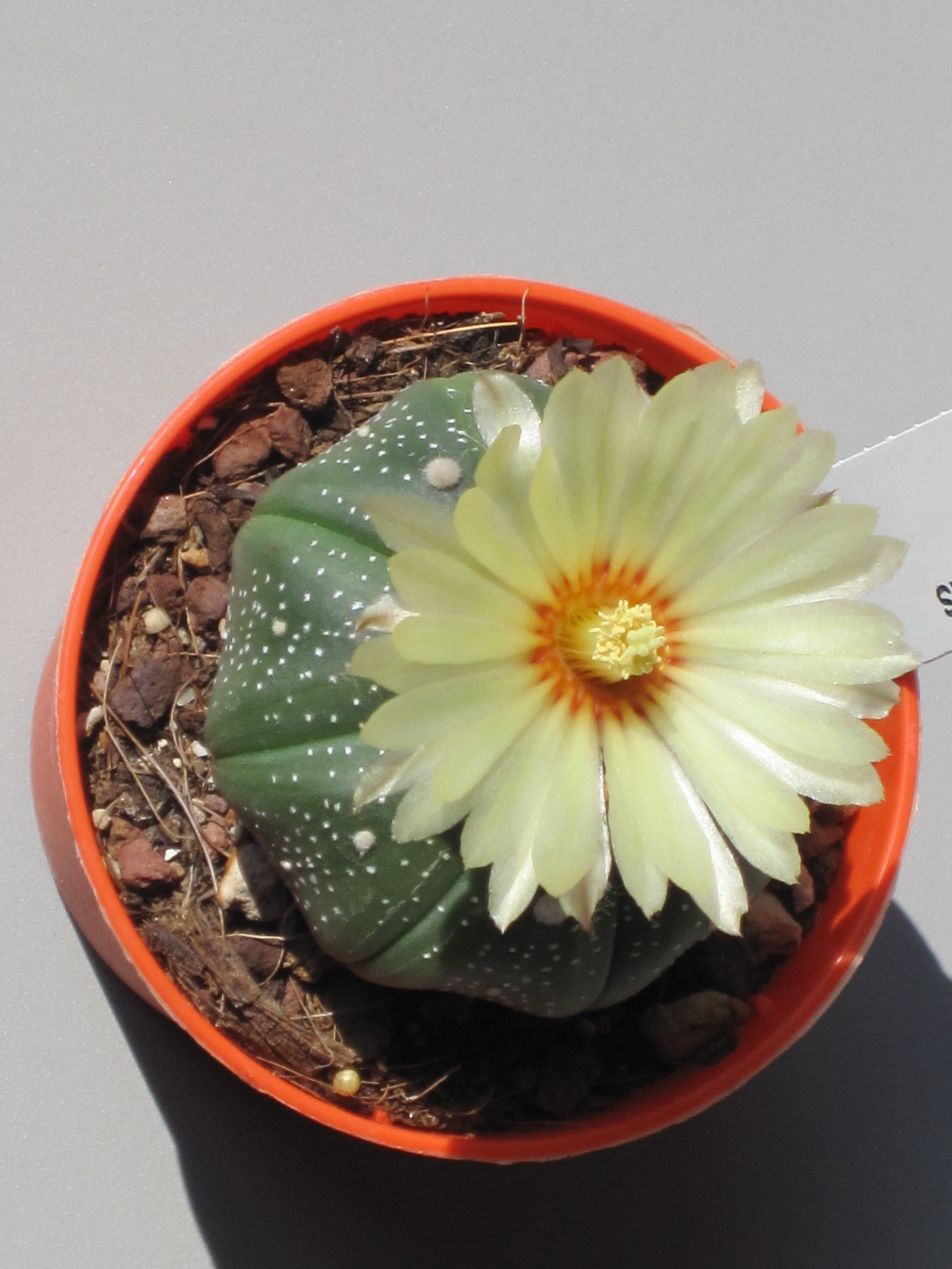 Astrophytum asterias fiorito visto dall'alto